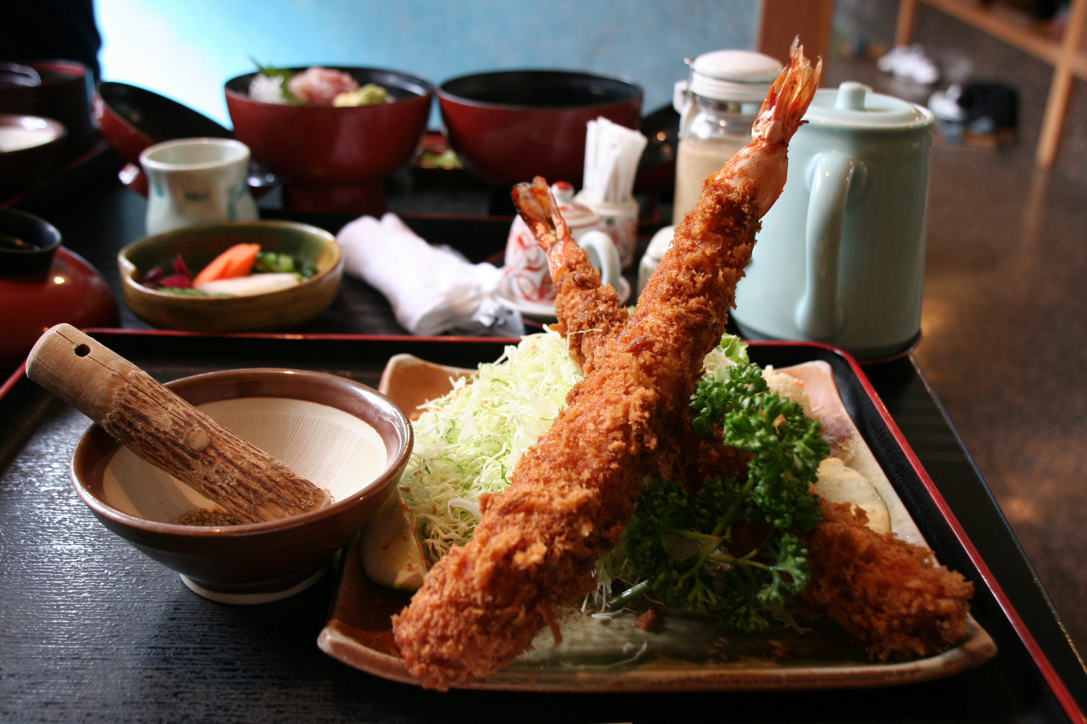 伊東市・和むら総本店のエビフライ定食。